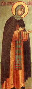 Прападобная Еўфрасіння Полацкая. Ікона. Русь. Канец XVII стагоддзя.